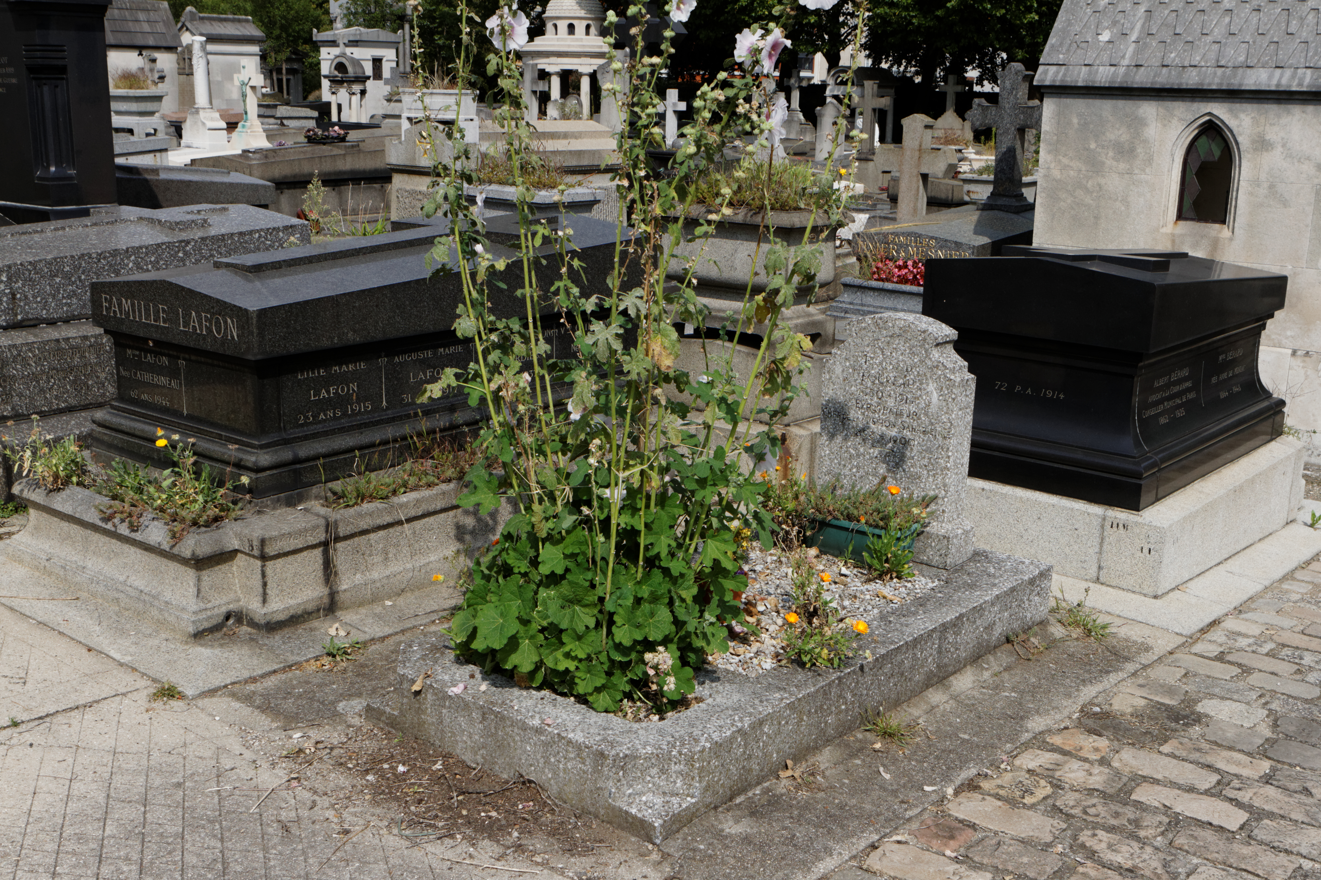 Sépulture de Fernand Foureau (1850-1914), explorateur français du Sahara et qui fut notamment gouverneur de la Martinique de 1908 à 1913.